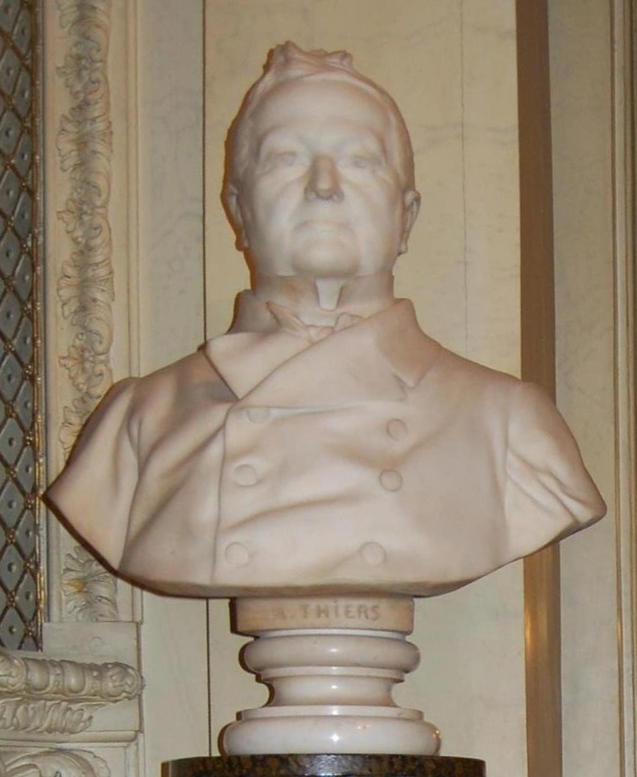 buste d'adolphe thiers par Chapu palais du luxembourg